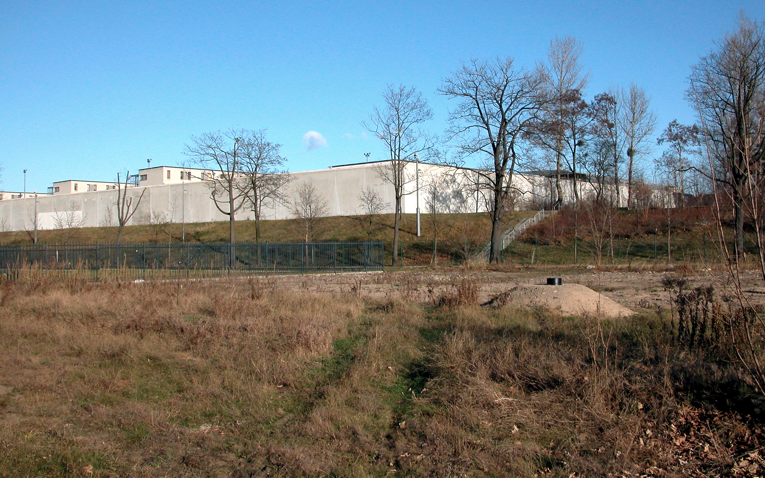 26.11.2009 01127 Dresden-Albertstadt: JVA Hammerweg, Justizvollzugsanstalt (GMP: 51.088901,13.747412). Die im Juli 2000 eingeweihte Anlage bietet hier Platz für 750 (bis 805) Strafgefangene. Errichtet wurde sie als Ersatz für das Gefängnis an der Schießgasse. Sicht von Süden. [DSCN40276.TIF]20091126010DR.JPG(c)Blobelt